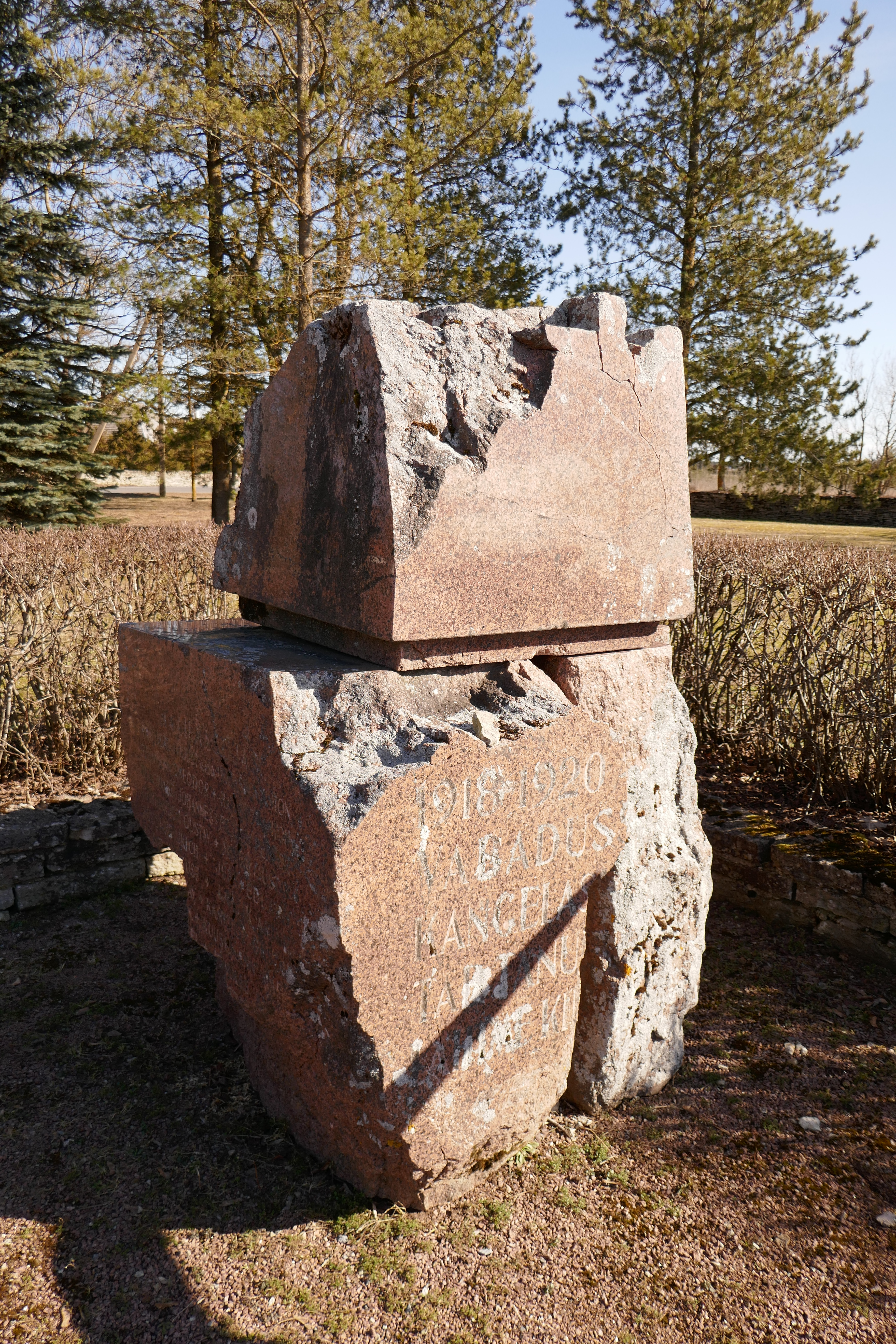 1939. aastal valminud Jõelähtme Vabadussõja mälestussammas. Asub taastatud samba lähistel.